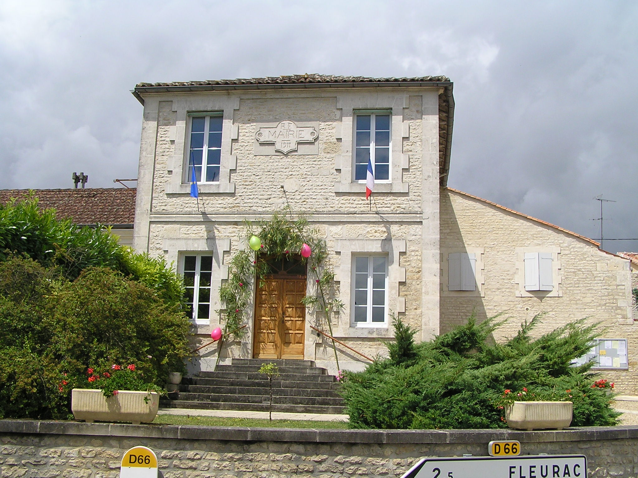 mairie de Vaux-Rouillac